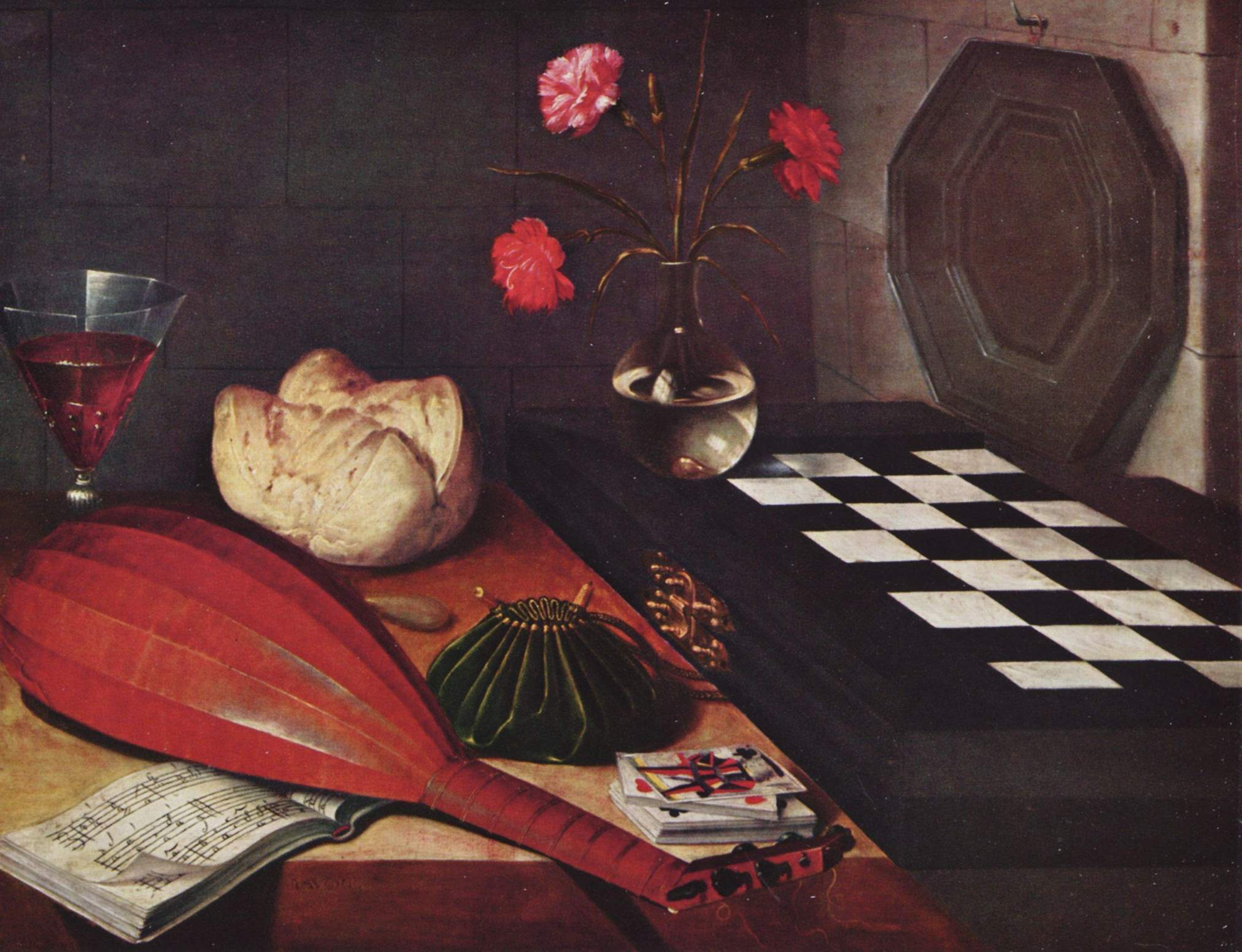 « ... une aumônière, une bourse de cuir vert fermée par un cordonnet de cuir noir... » (Georges Perec, La Vie mode d'emploi).